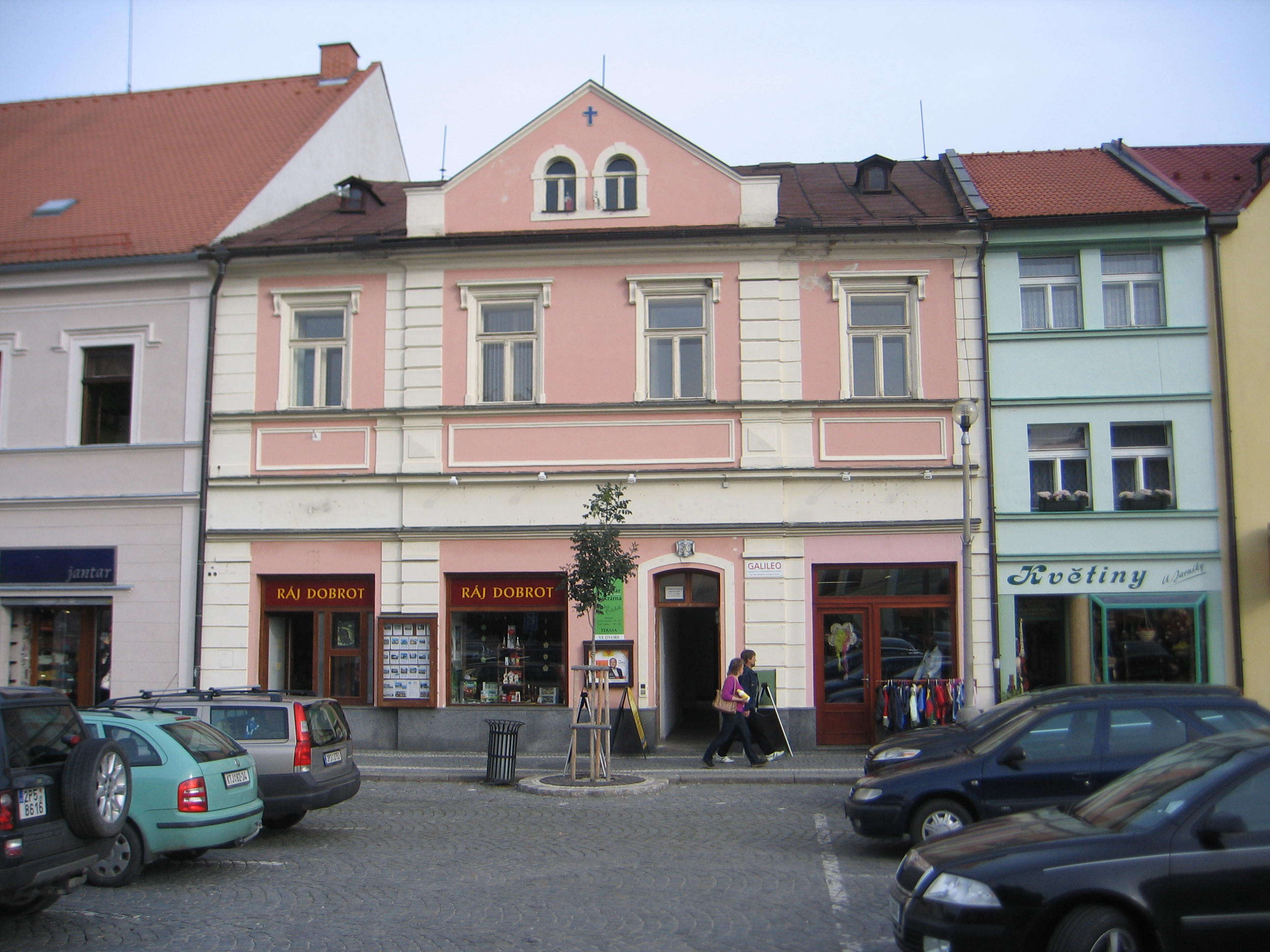 Měšťanský dům (Sušice), nám. Svobody 36, Sušice